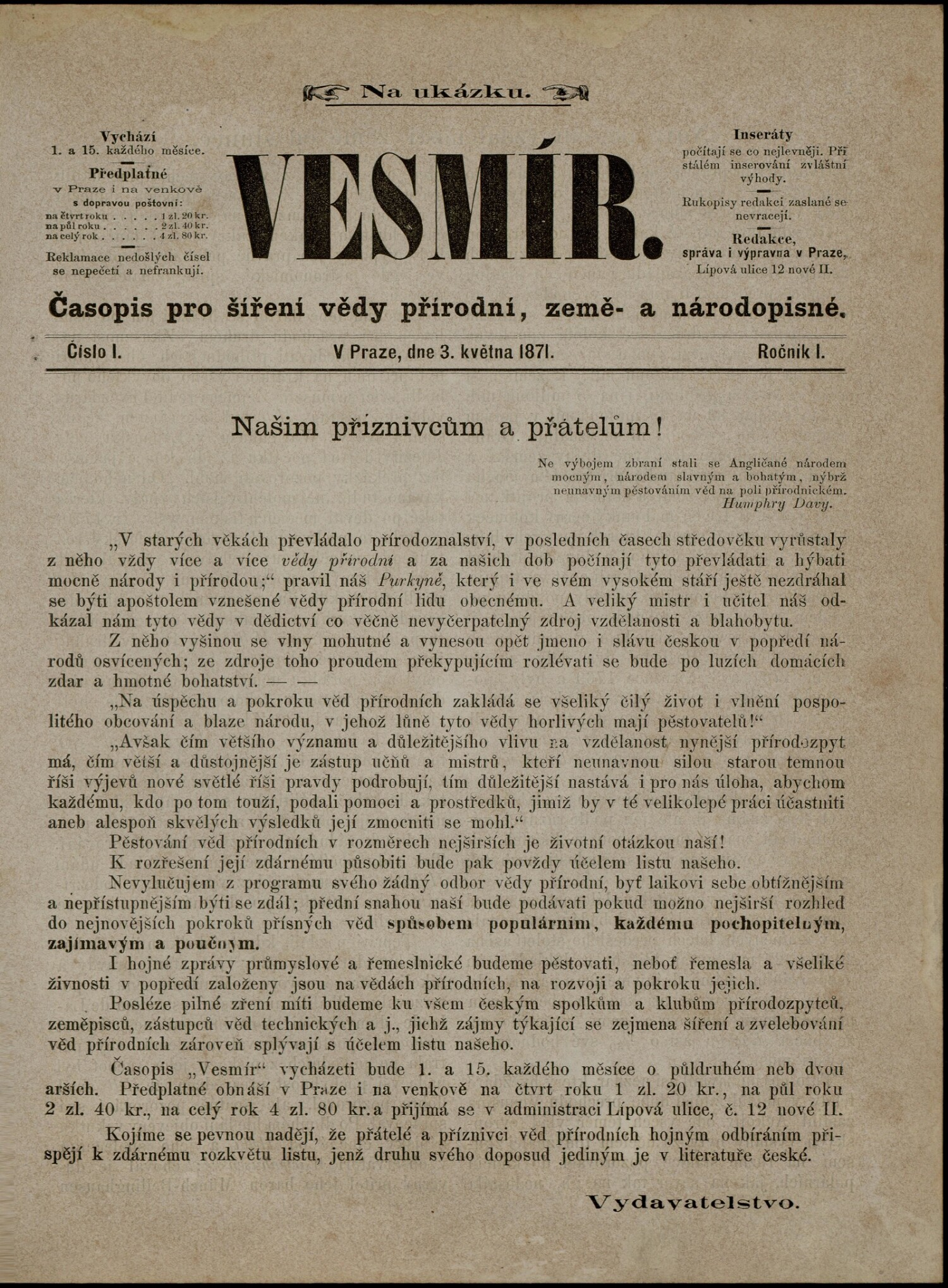 Úvodní strana časopisu Vesmír, číslo 1, ročník 1.